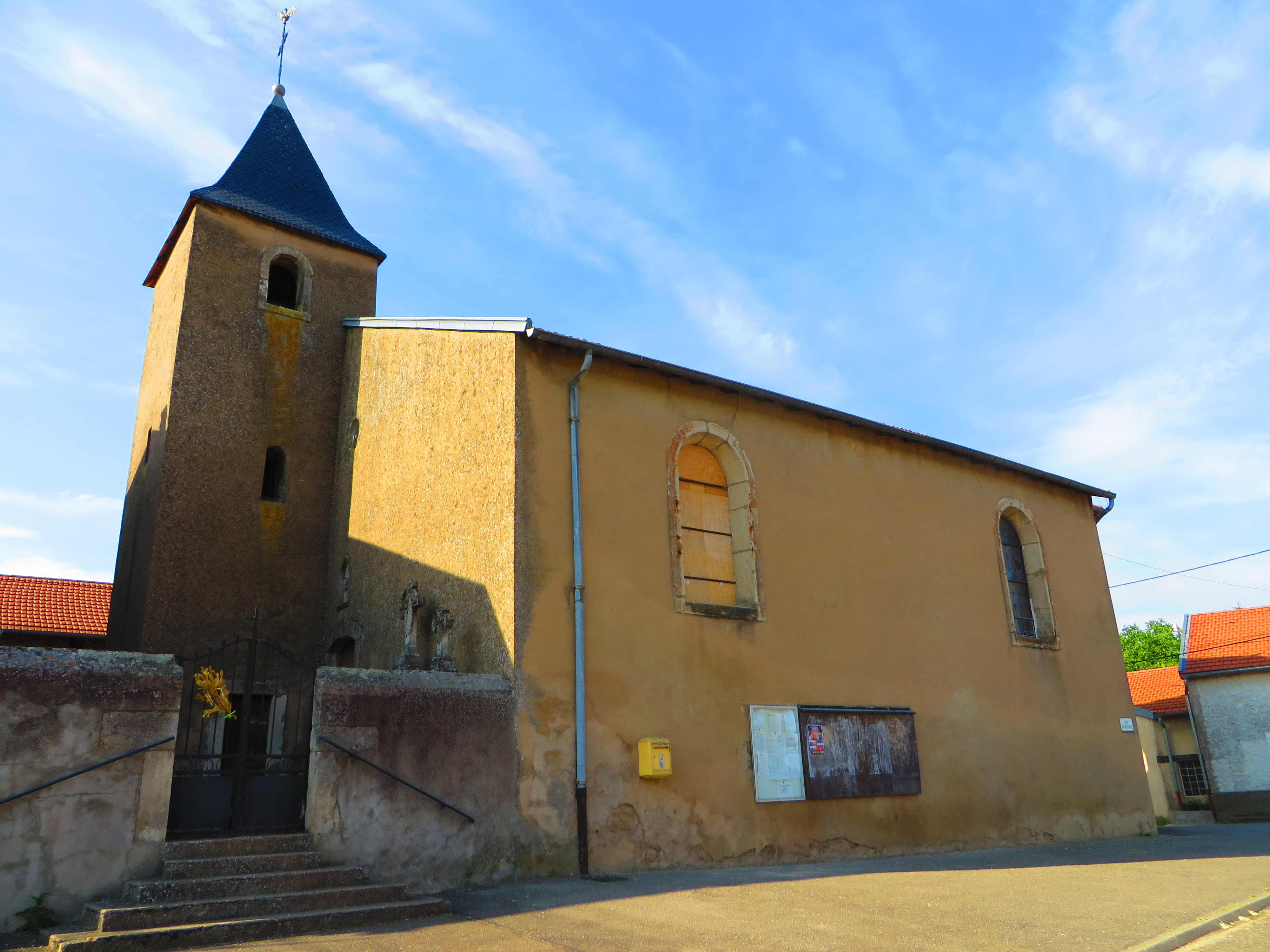 Holacourt eglise